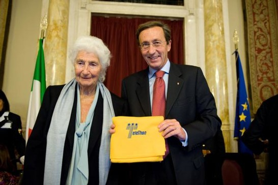 Conferenza stampa Telethon 2008